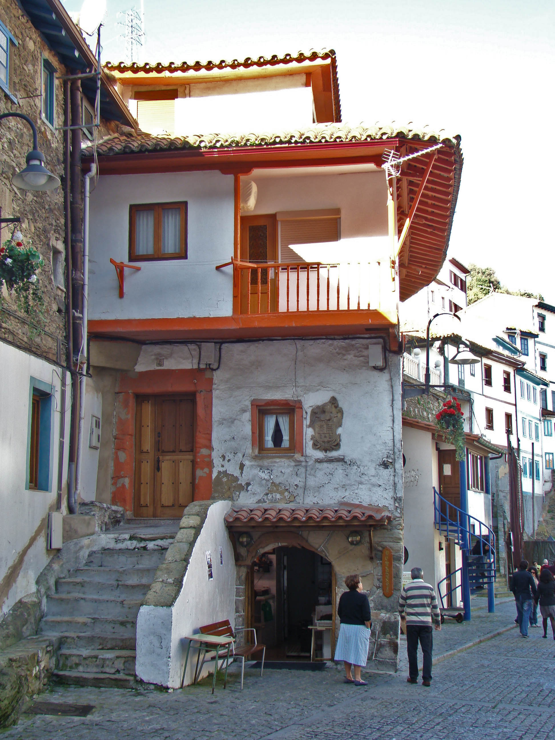 Cudillero es un concejo y parroquia del Principado de Asturias (España). Es un importante puerto pesquero. En la foto, rincón pintoresco.